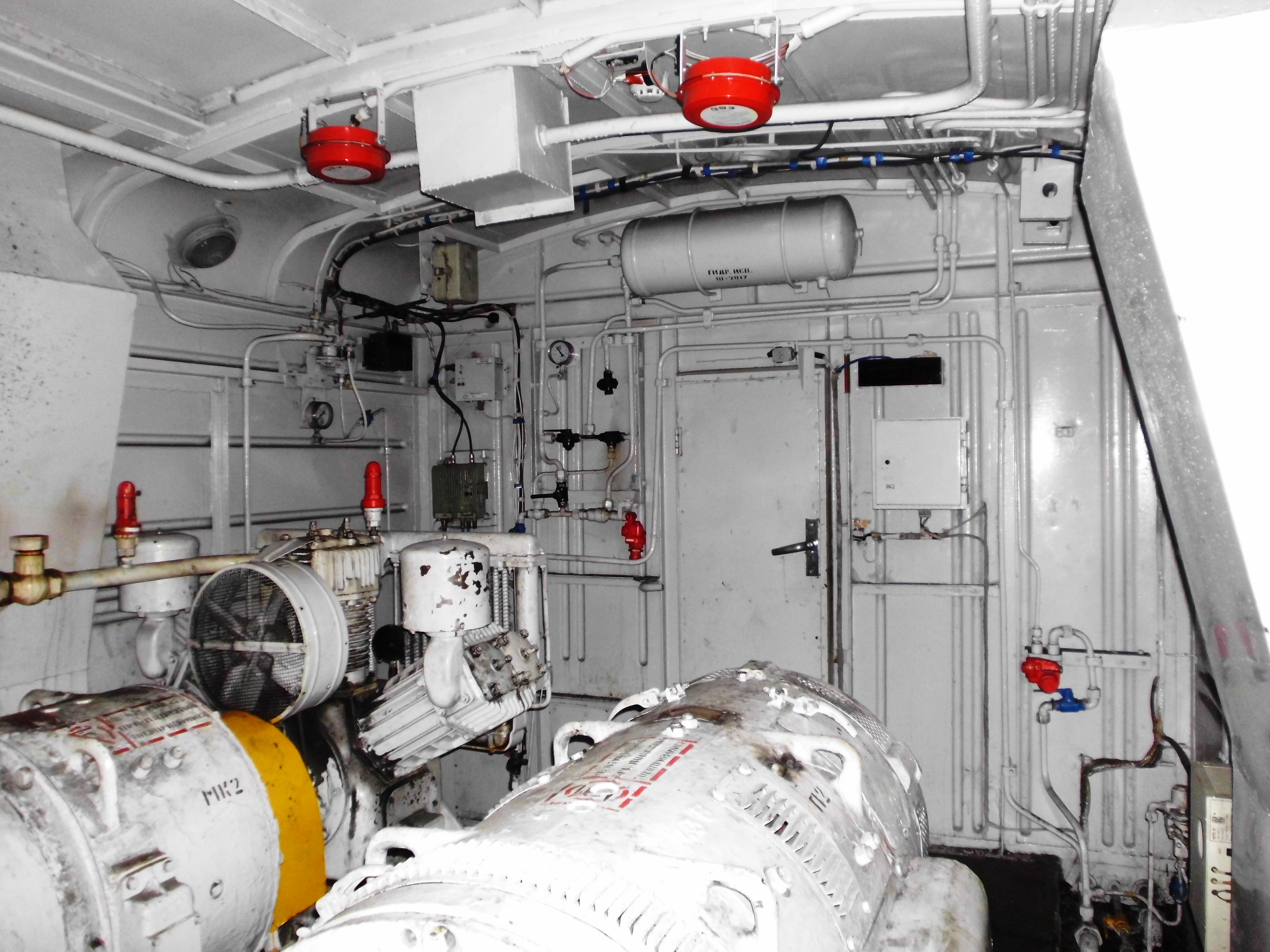 ВЛ-10. Машинное отделение. Торцевая дверь в соседнюю секцию, мотор-компрессор, мотор-генератор, справа и слева у стенки трапециевидные задние ёмкости для песка. Сверху 2 красных плоских цилиндра - аэрозольные модули автоматической системы пожаротушения.